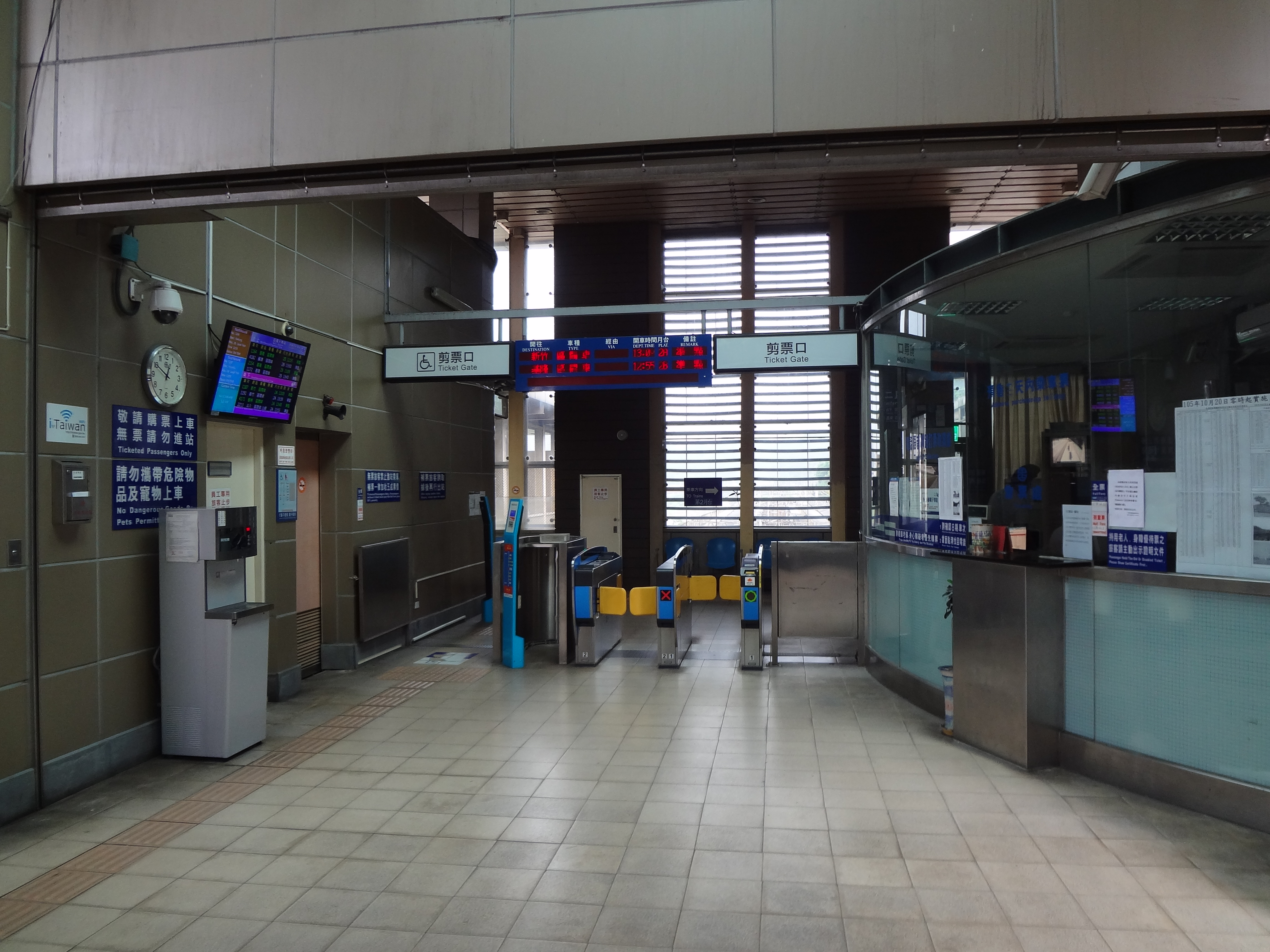 臺灣鐵路管理局百福車站大廳，中央為剪票口與Omron門檔式閘門，右側為售票處。